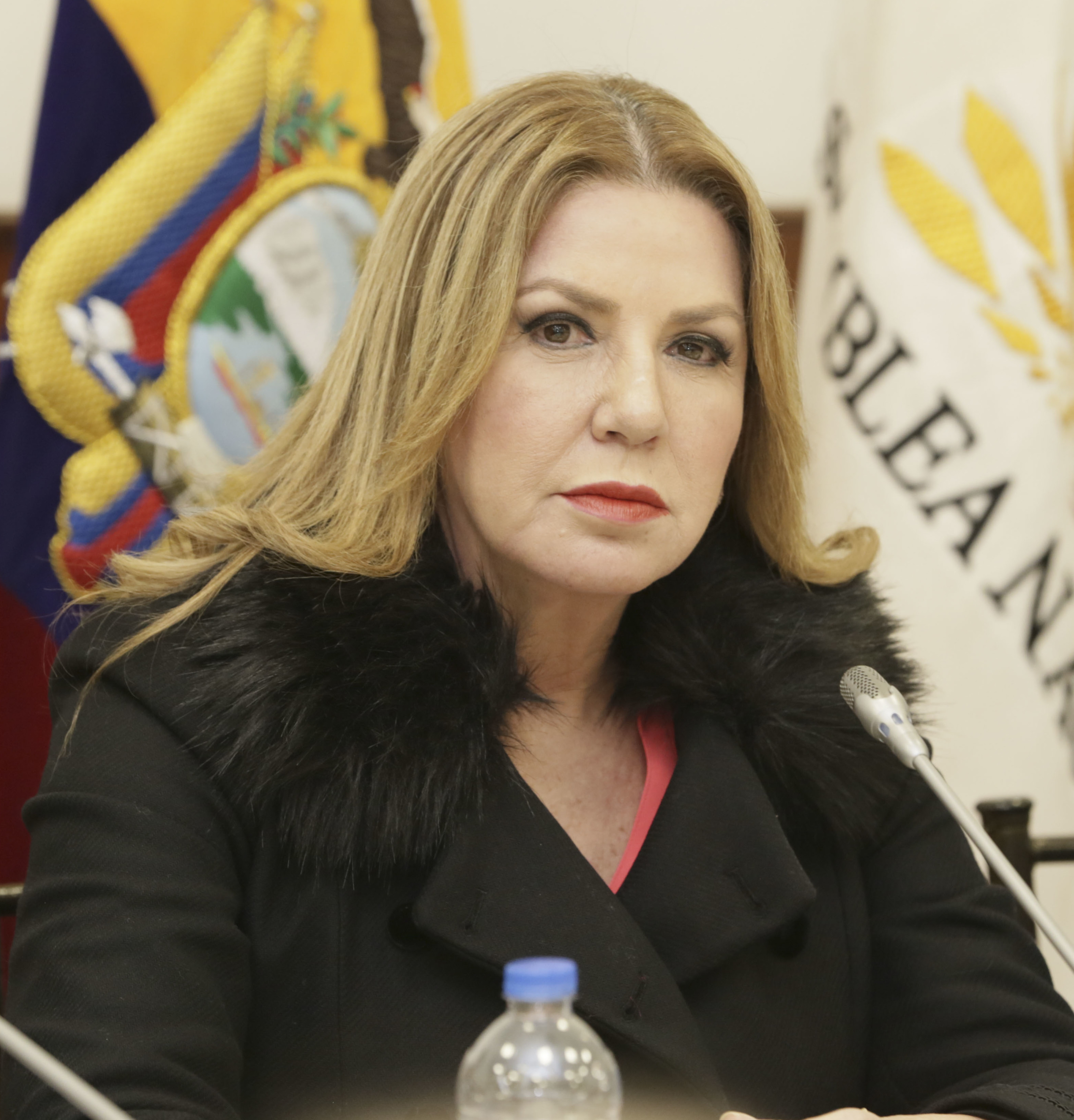 Quito,29 de mayo 2018.-El Asambleista Jorge Yunda invita al conversatorio:Hacia un nuevo Sistema de Salud. Fotos: Diego Cevallos / Asamblea Nacional.